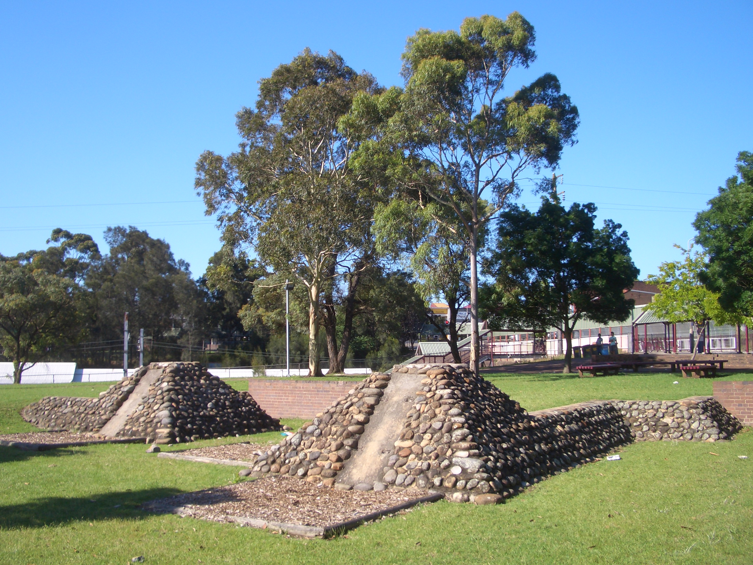 Nugent Park, Chester Hill